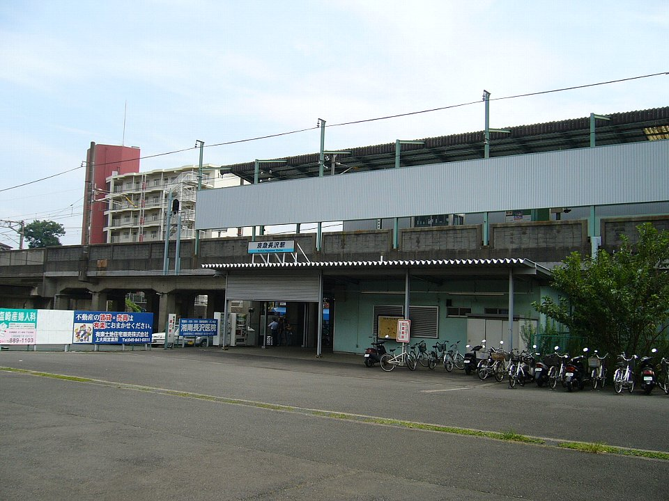 京急長沢駅 駅舎 2006年9月7日 Bakkai撮影